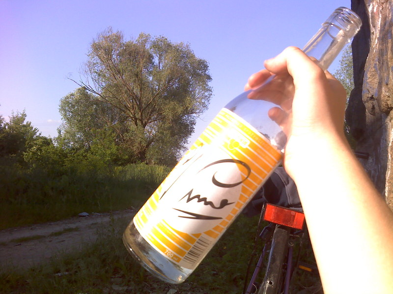 butelka wina